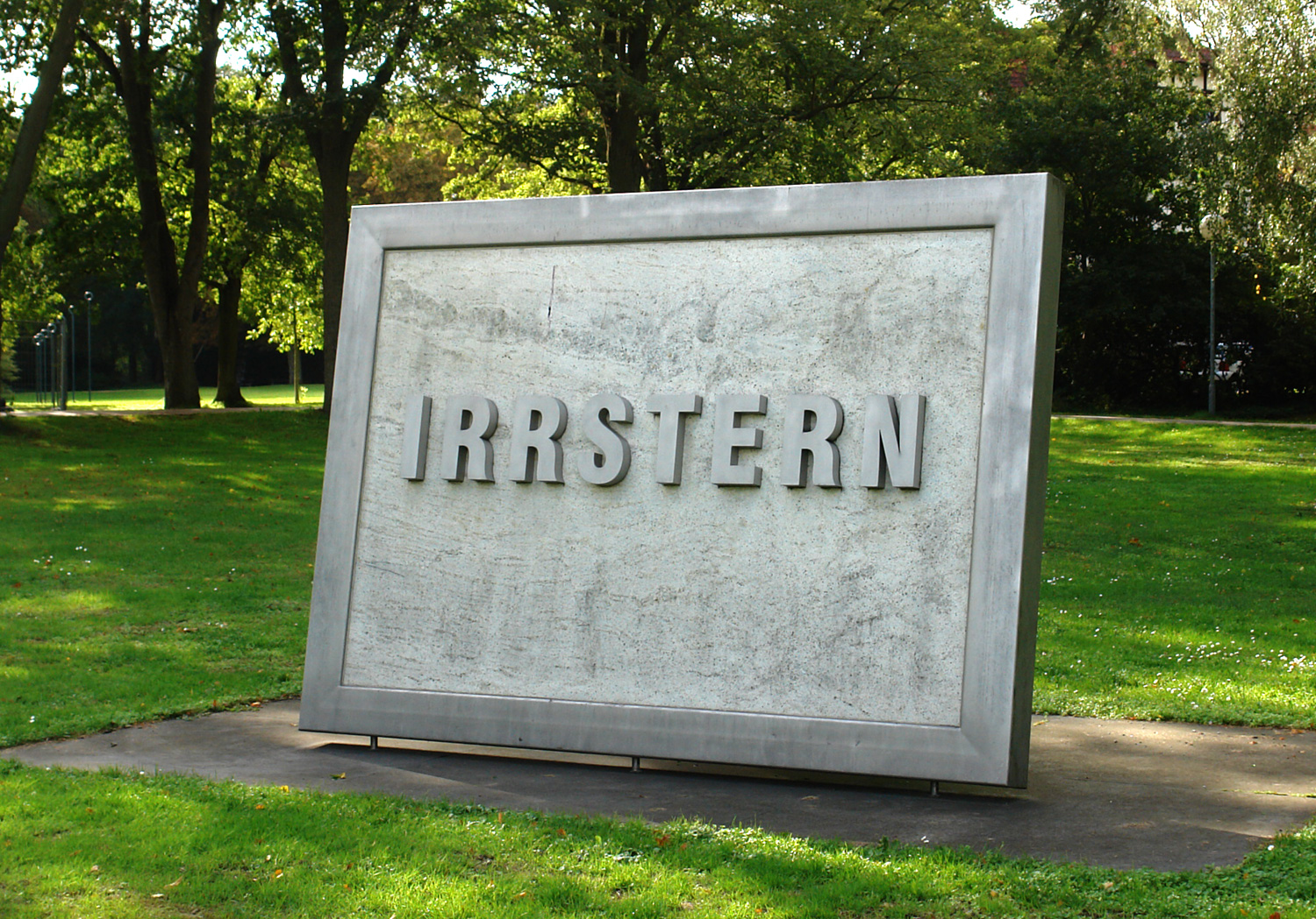 Klinikum Bremen-Ost. Kunst im öffentlichen Raum: Irrstern, Marikke Heinz-Hoek, 2000. Ein Mahnmal für die Opfer der Psychiatrie im 3. Reich k: kunst im öffentlichen raum bremen